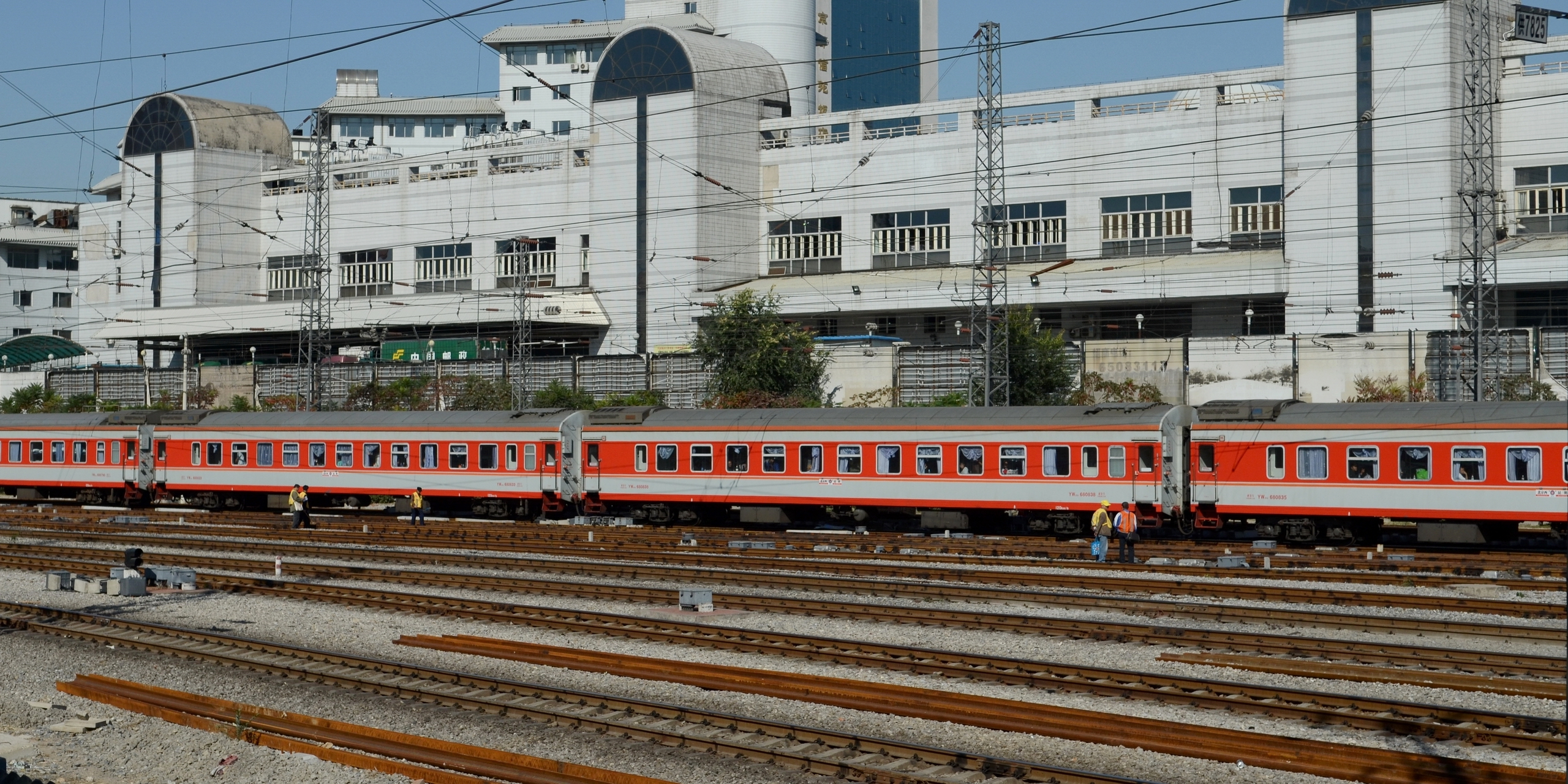 昆明至北京西K472次列车编组使用25G型客车到达北京西客站